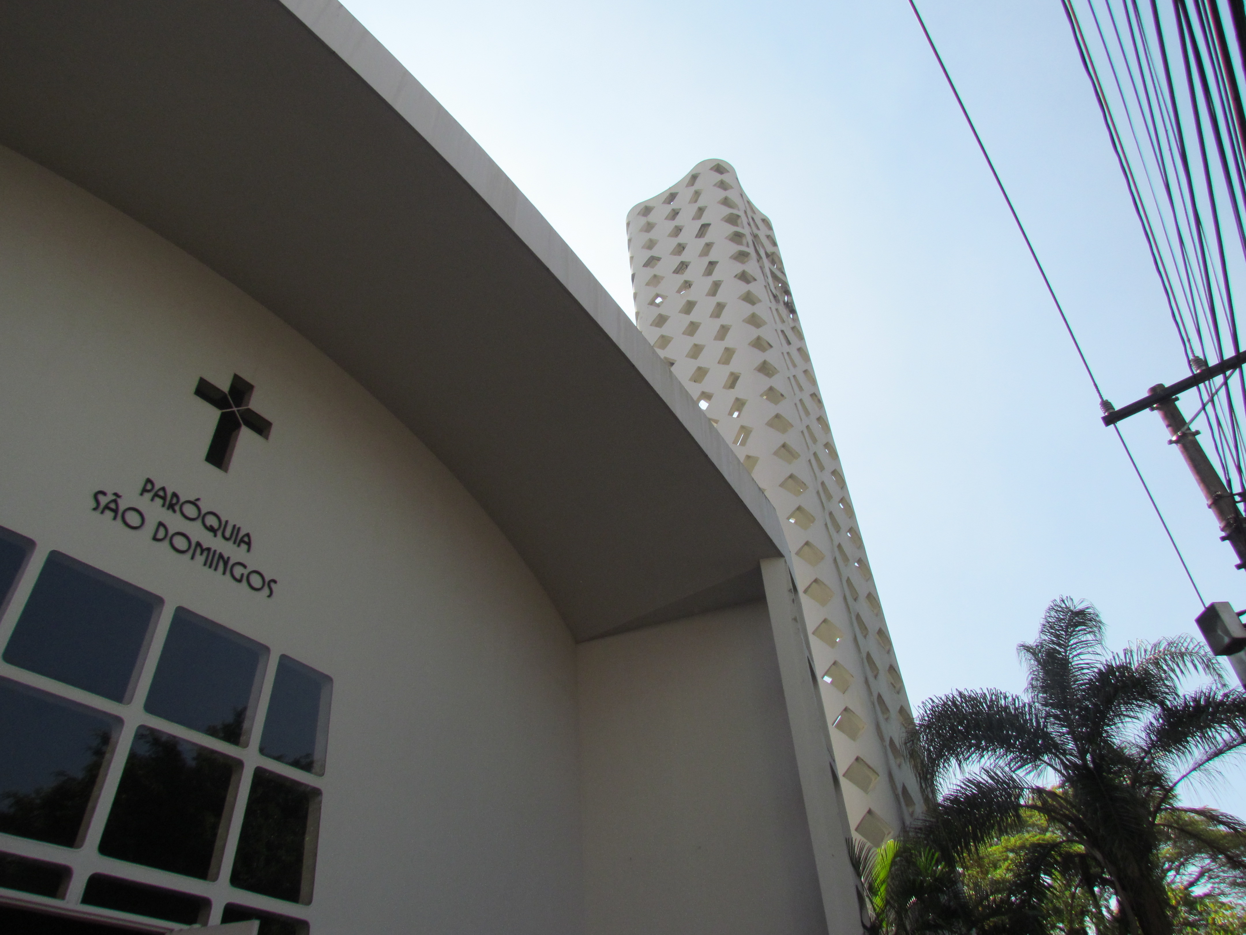 Torre e fachada da Igreja de São Domingos, em São Paulo (SP), Brasil.